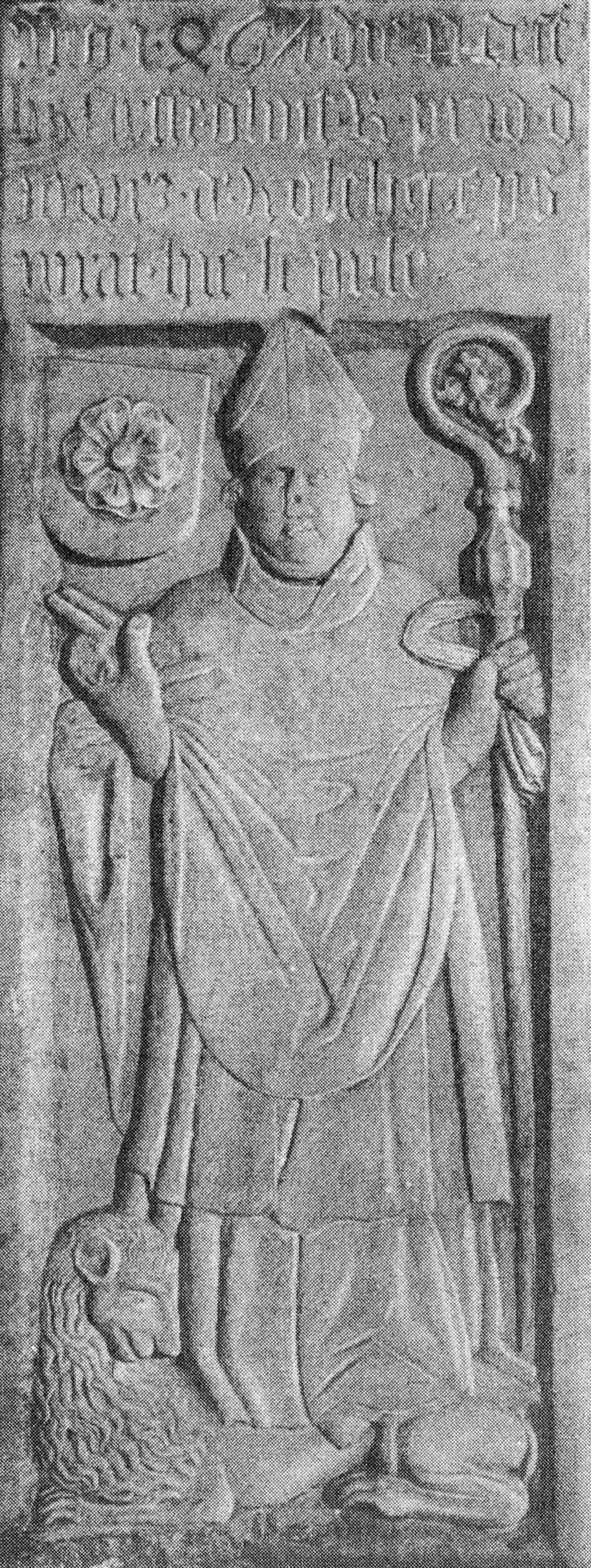 Náhrobek biskupa Jošta z Rožmberka